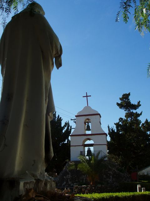 Mission San Antonio de Pala